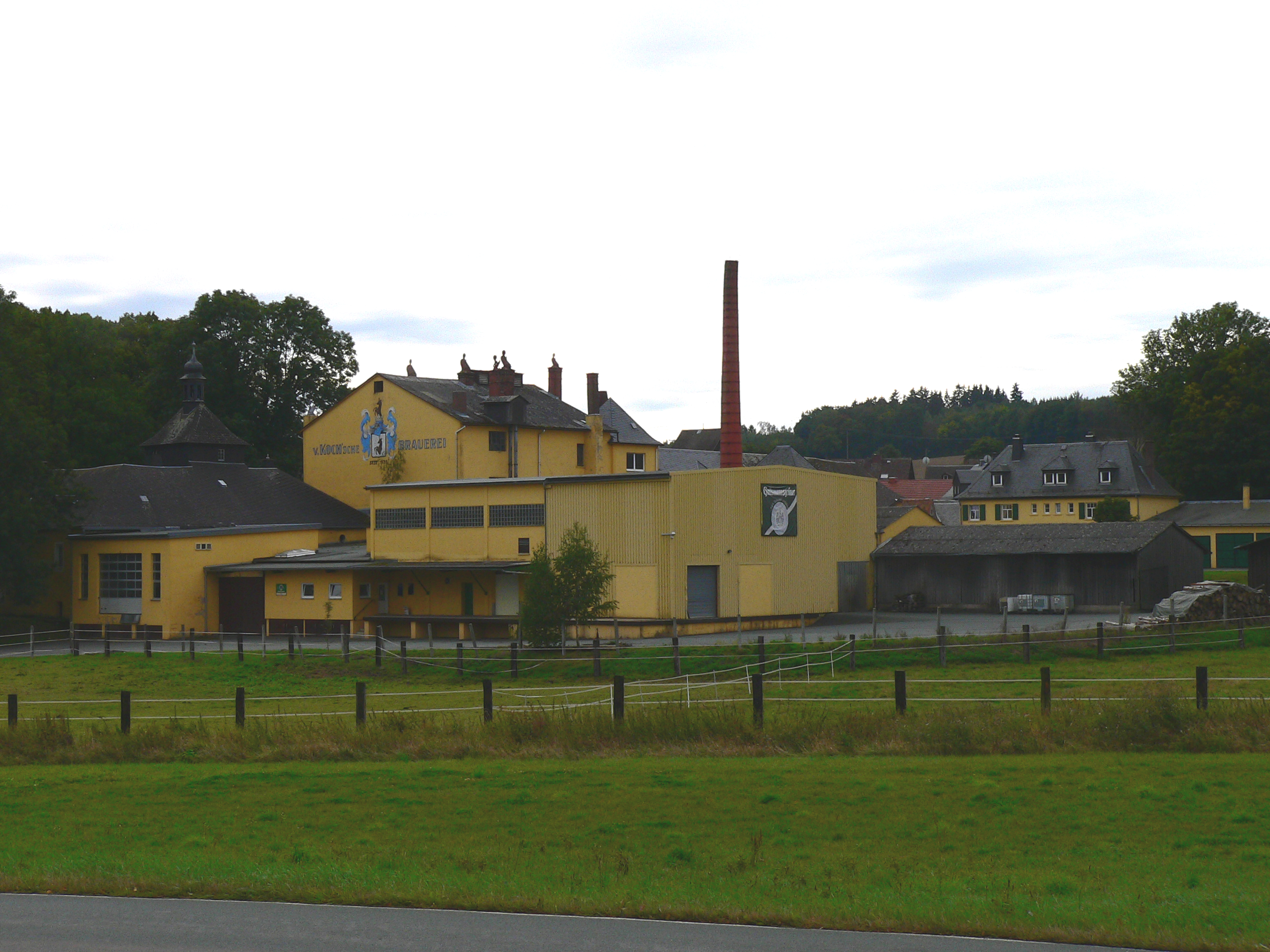 Schloss in Berg-Gottmansgrün, Bayern, Regierungsbezirk Oberfranken, Landkreis Hof